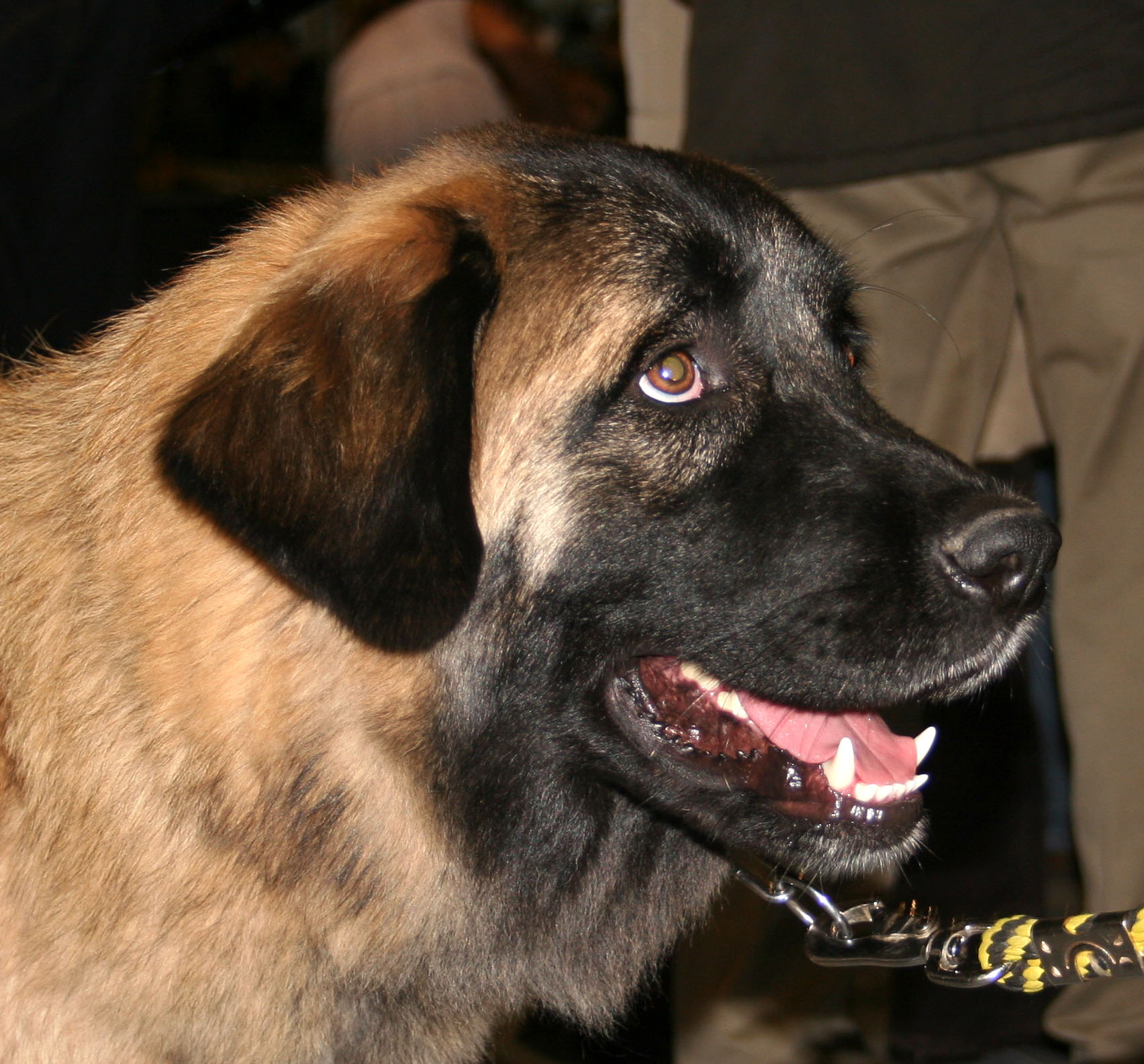 Cao_da_serra_da_estrela na Światowej Wystawie Psów Rasowych w Poznaniu